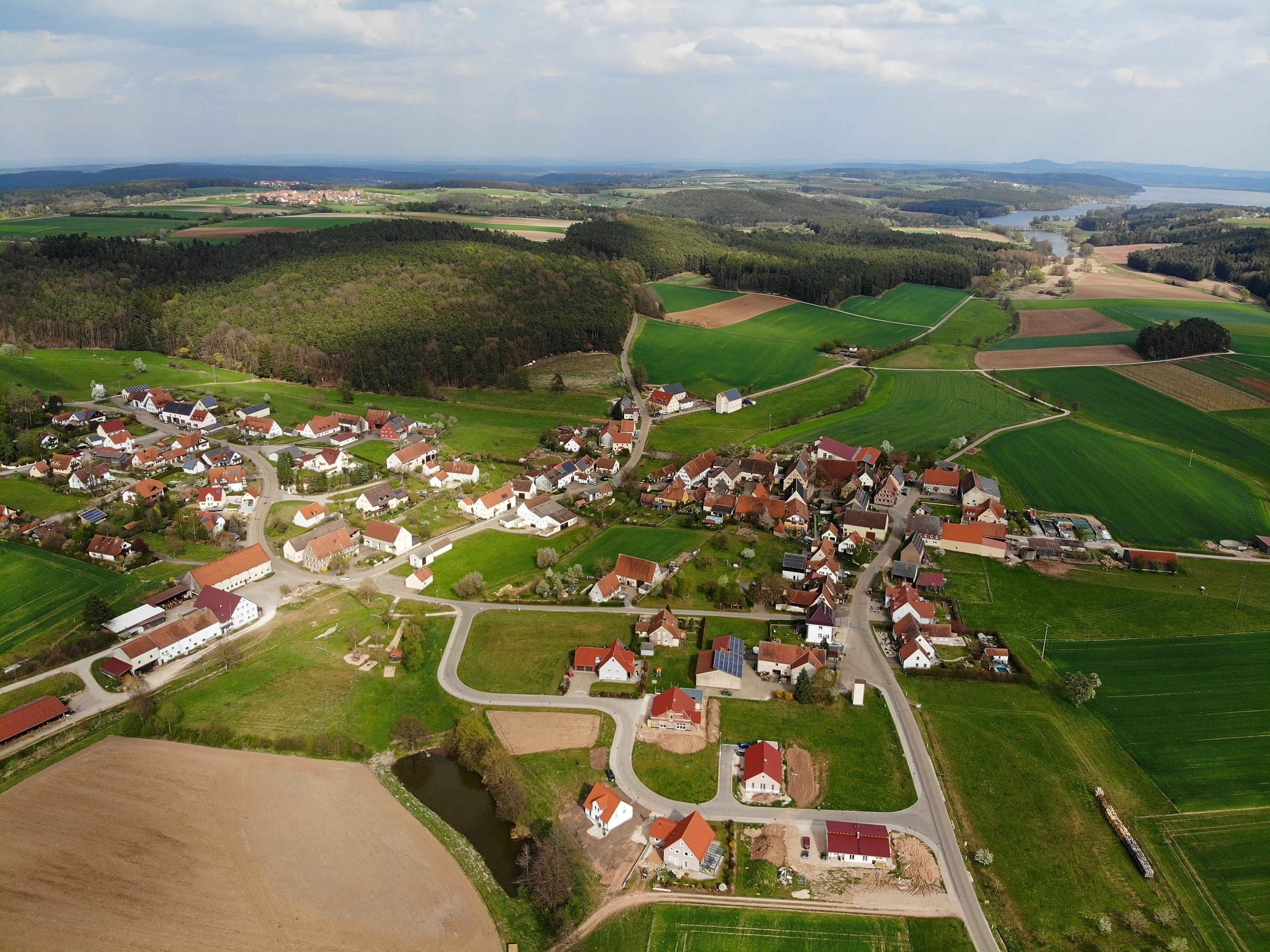 Igelsbach (Absberg) Luftaufnahme (2020)